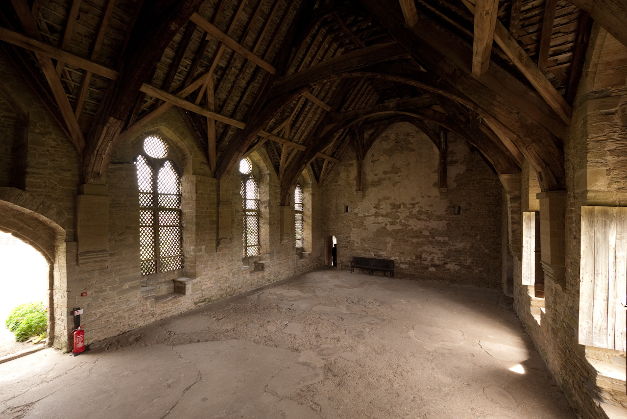 Stokesay Castle-21